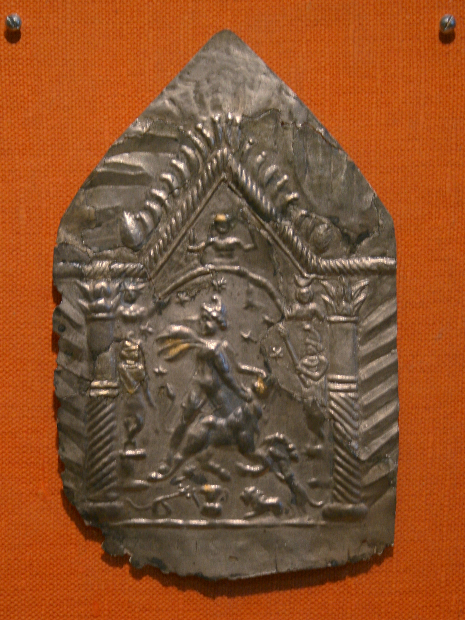 Silberne Votivtafel aus dem Mithräum in Stockstadt, ausgestellt im Saalburgmuseum Bad Homburg.